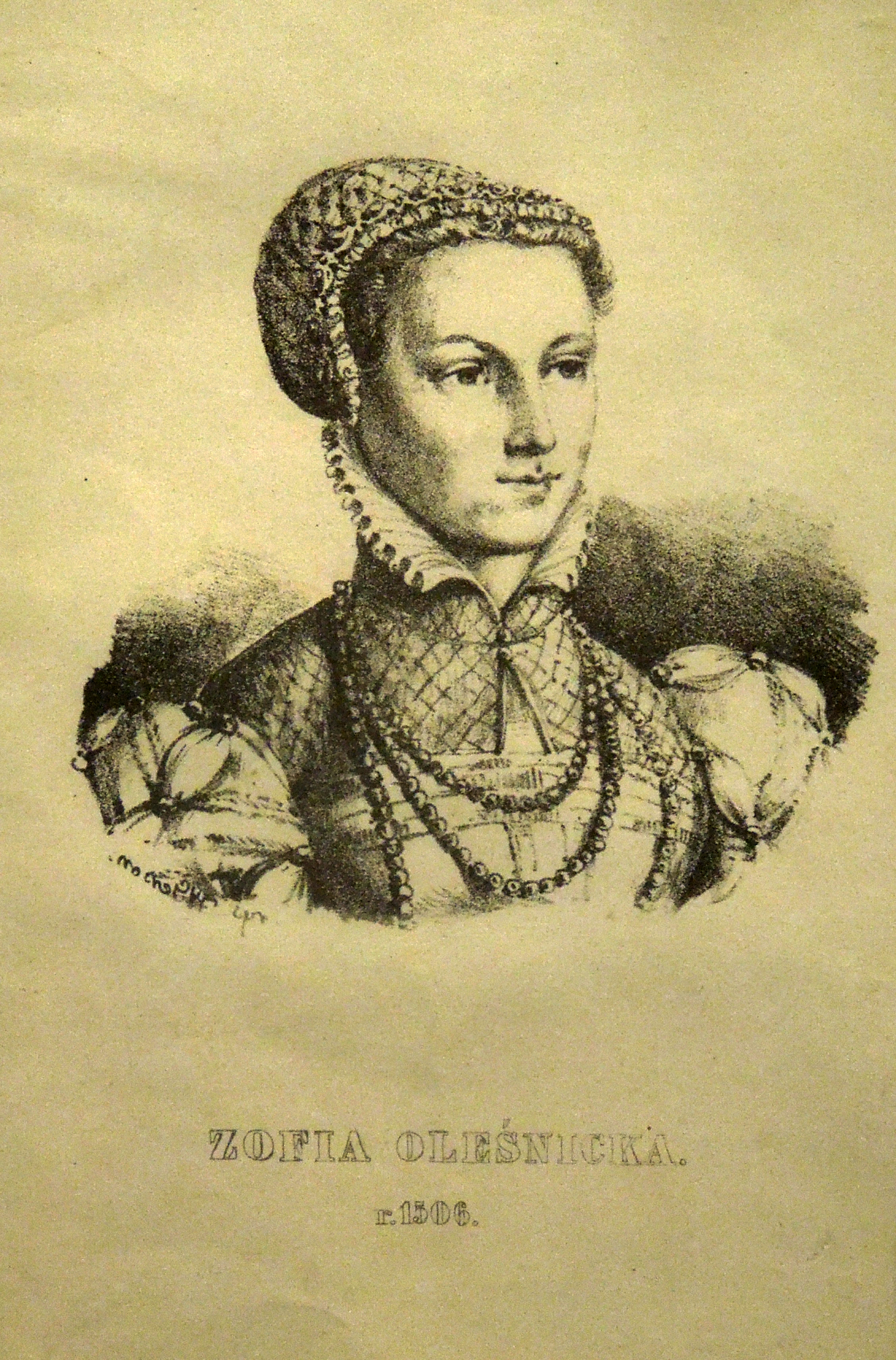 Autor nieznany - Zofia Oleśnicka; litografia, Polska